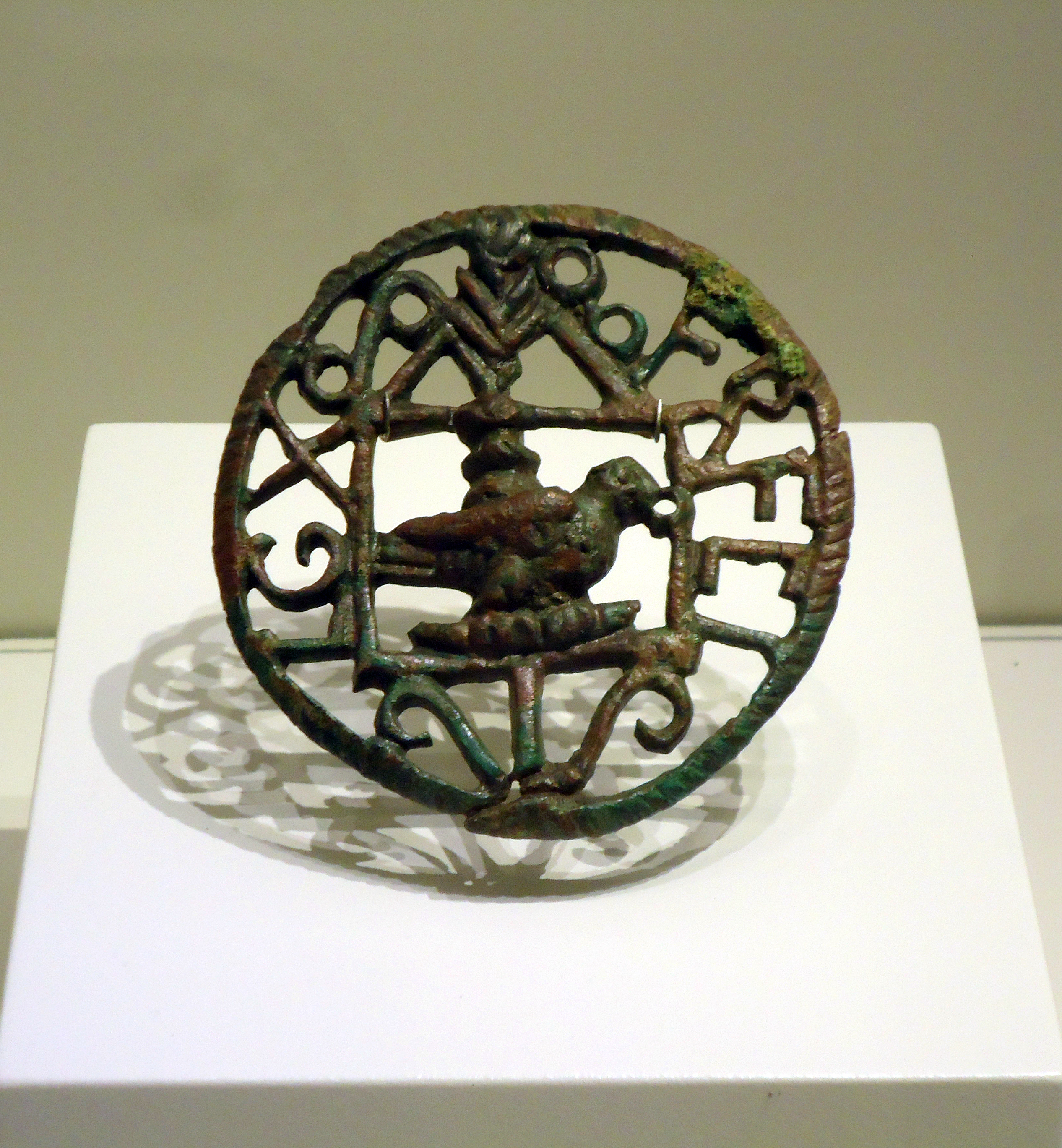 סיכת ברונזה בקוטר 80 ס"מ שהייתה חלק מהעיטורים שהוצמדו למדיו של חייל מההלגיון העשירי פרטנסיס בבליוגרפיה: Y. Meshorer, Two Finds from the Roman Tenth Legion, in: Israel Museum Journal 3 (1984), pp. 41-45